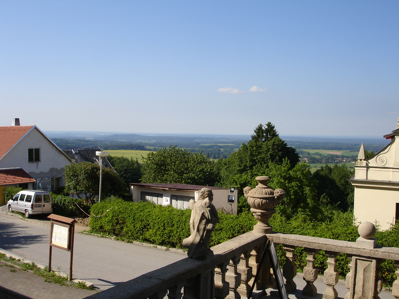 Dobrá Voda u Horní Stropnice; Ausblick von der Balustrade der Wallfahrtskirche auf das Wittingauer Becken